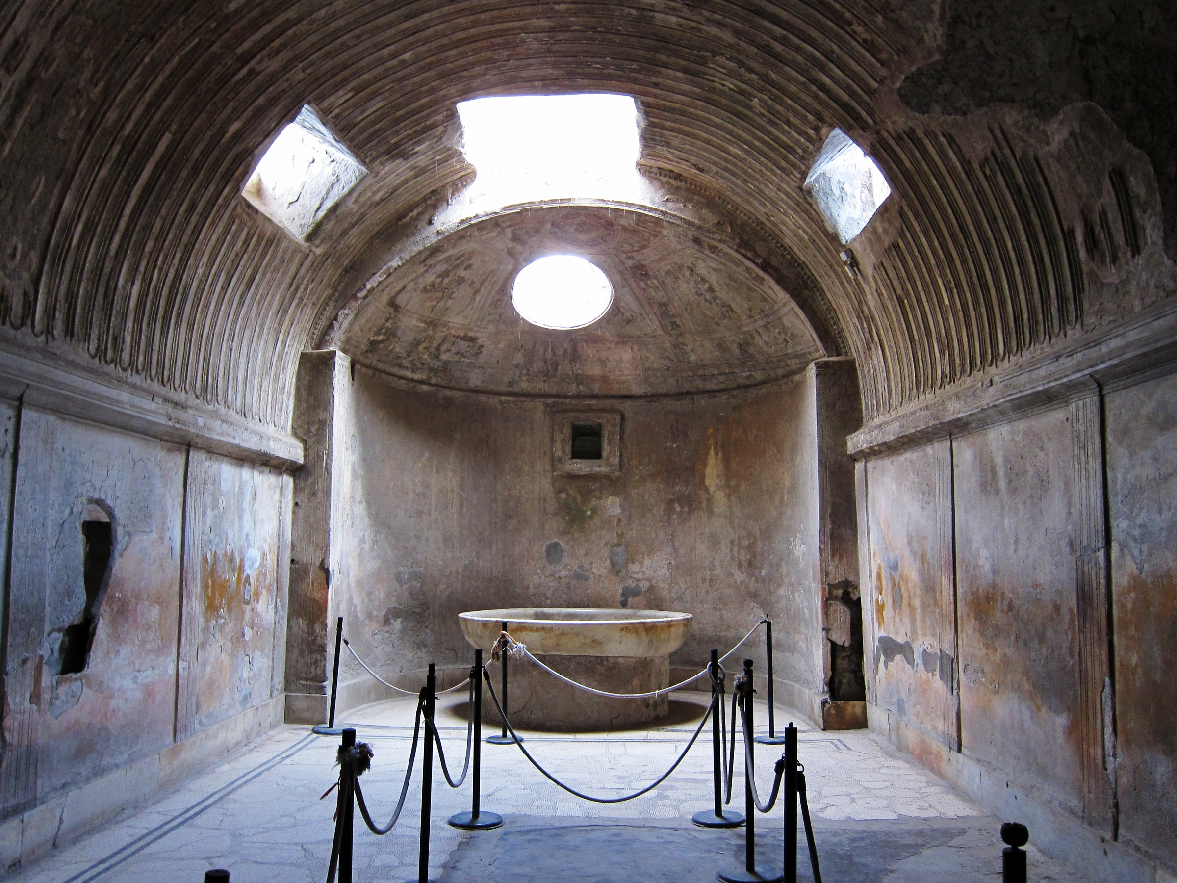 Caldarium des thermes de Pompei (Italie).